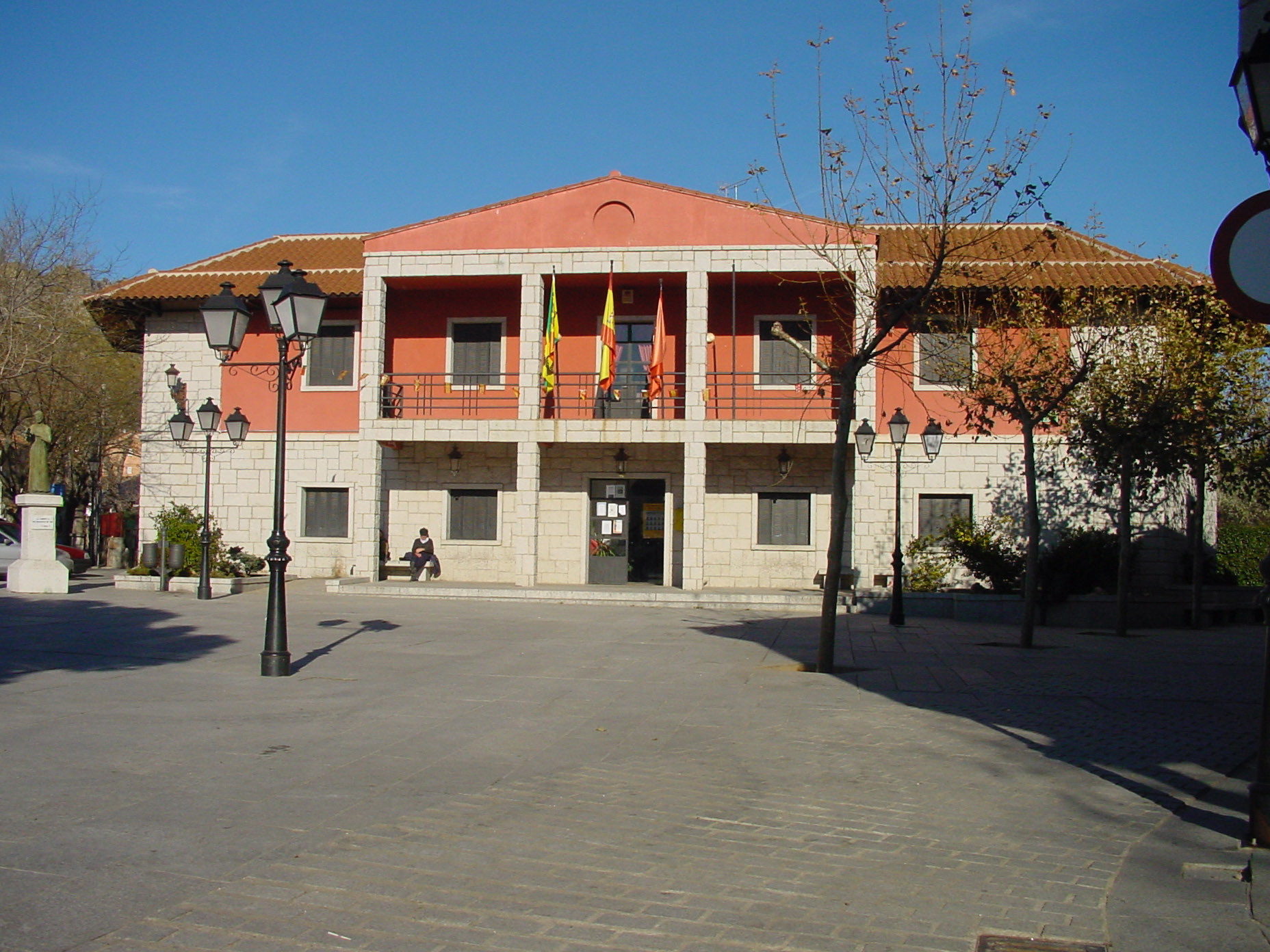 Ayuntamiento de La Cabrera.